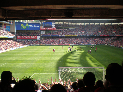 Estadio San Mamés,"La catedral".